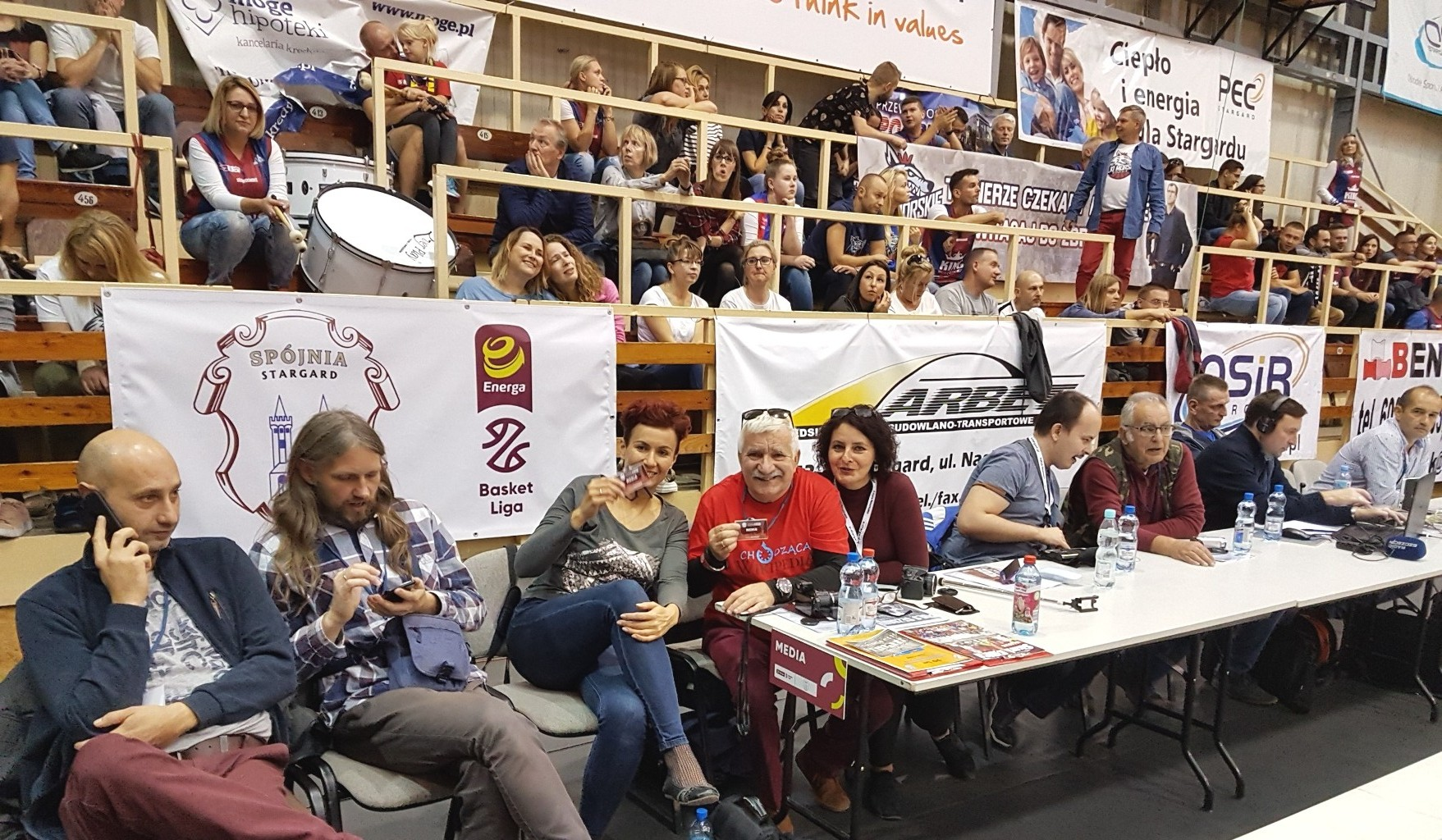 Media w Stargardzie (06.10.2018)